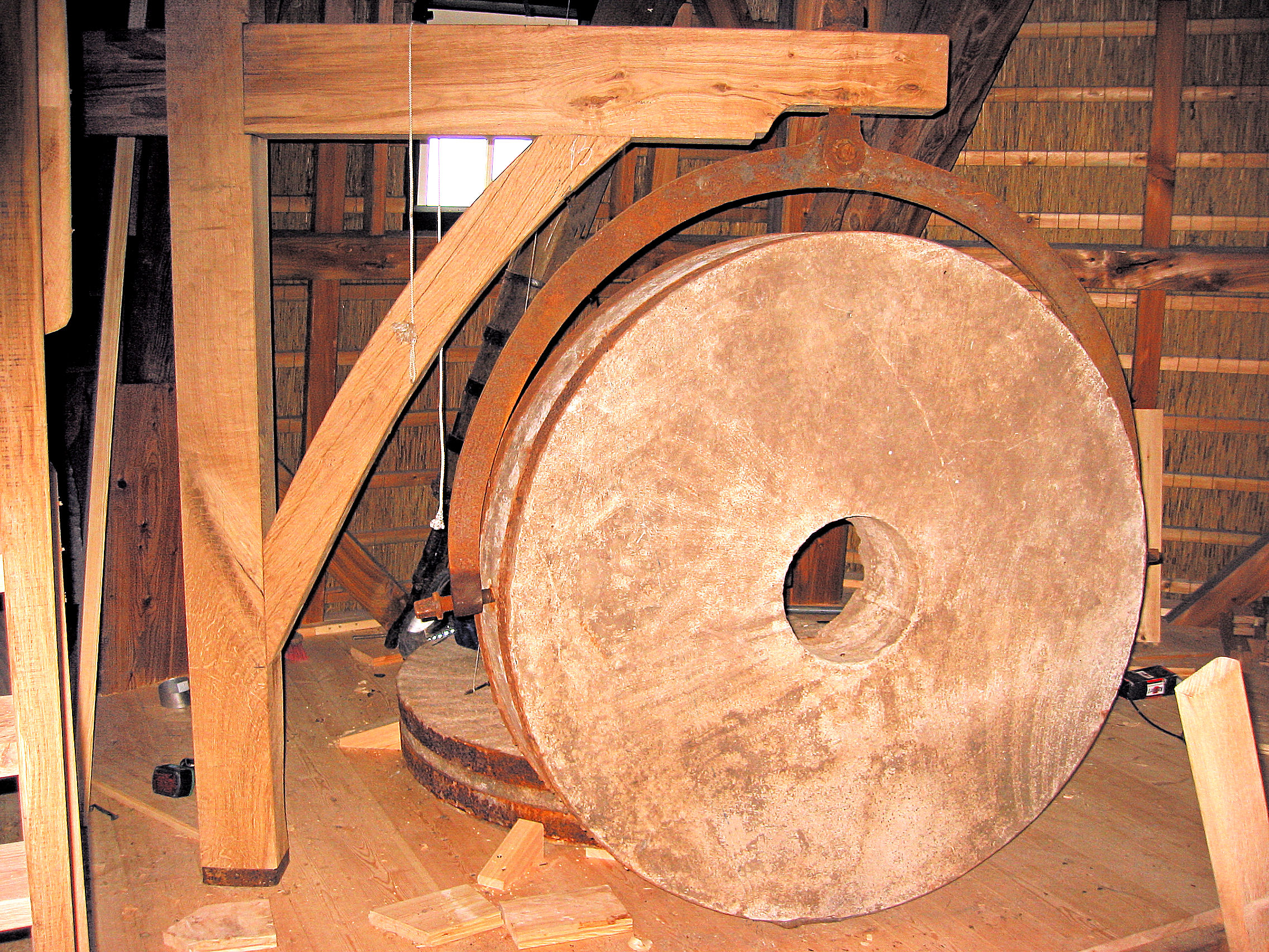 Steenkraan van de Concordia molen te Ede